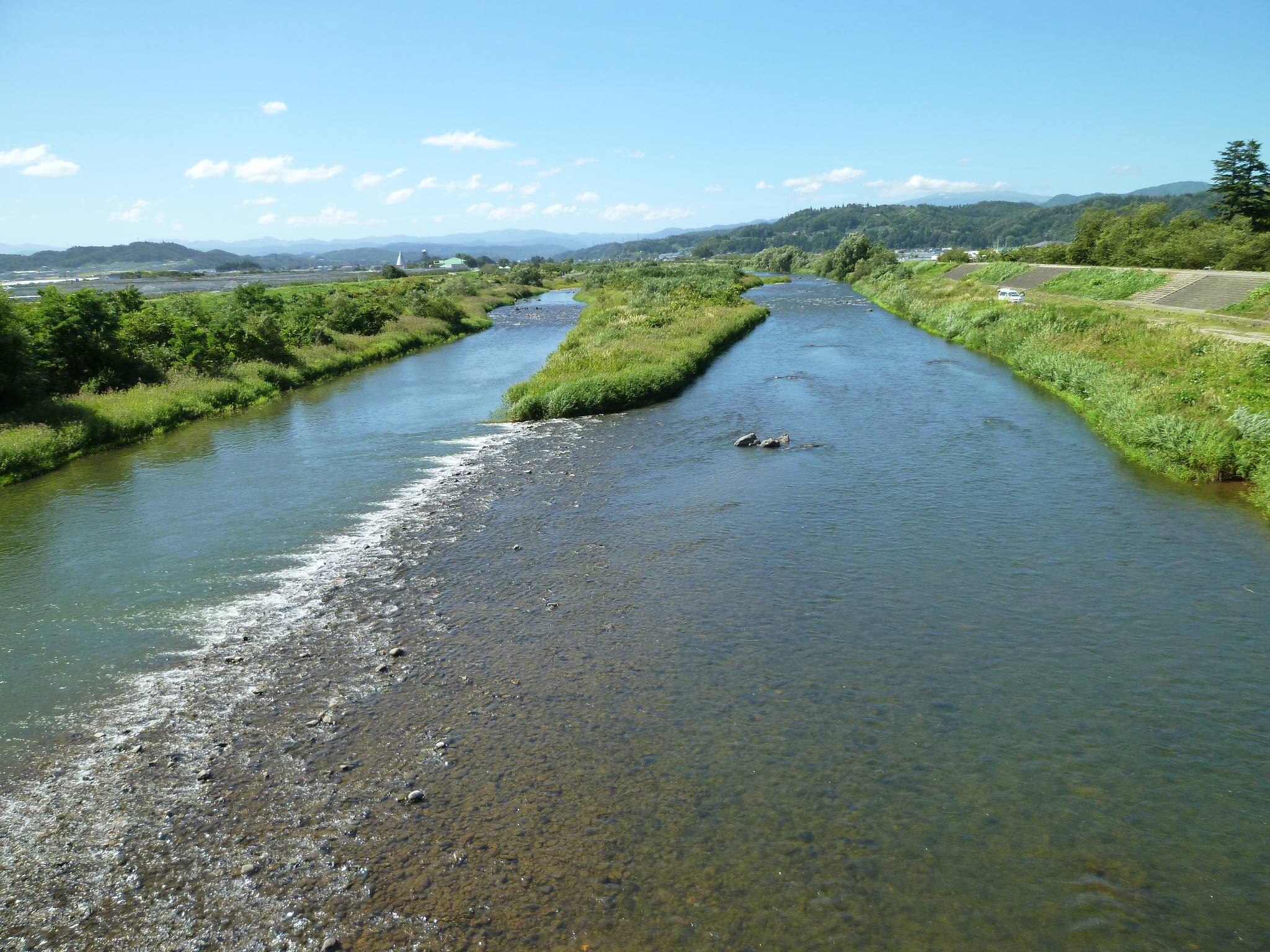 寒河江川。山形県寒河江市西根付近。県道25号の寒河江川橋から上流を望む。